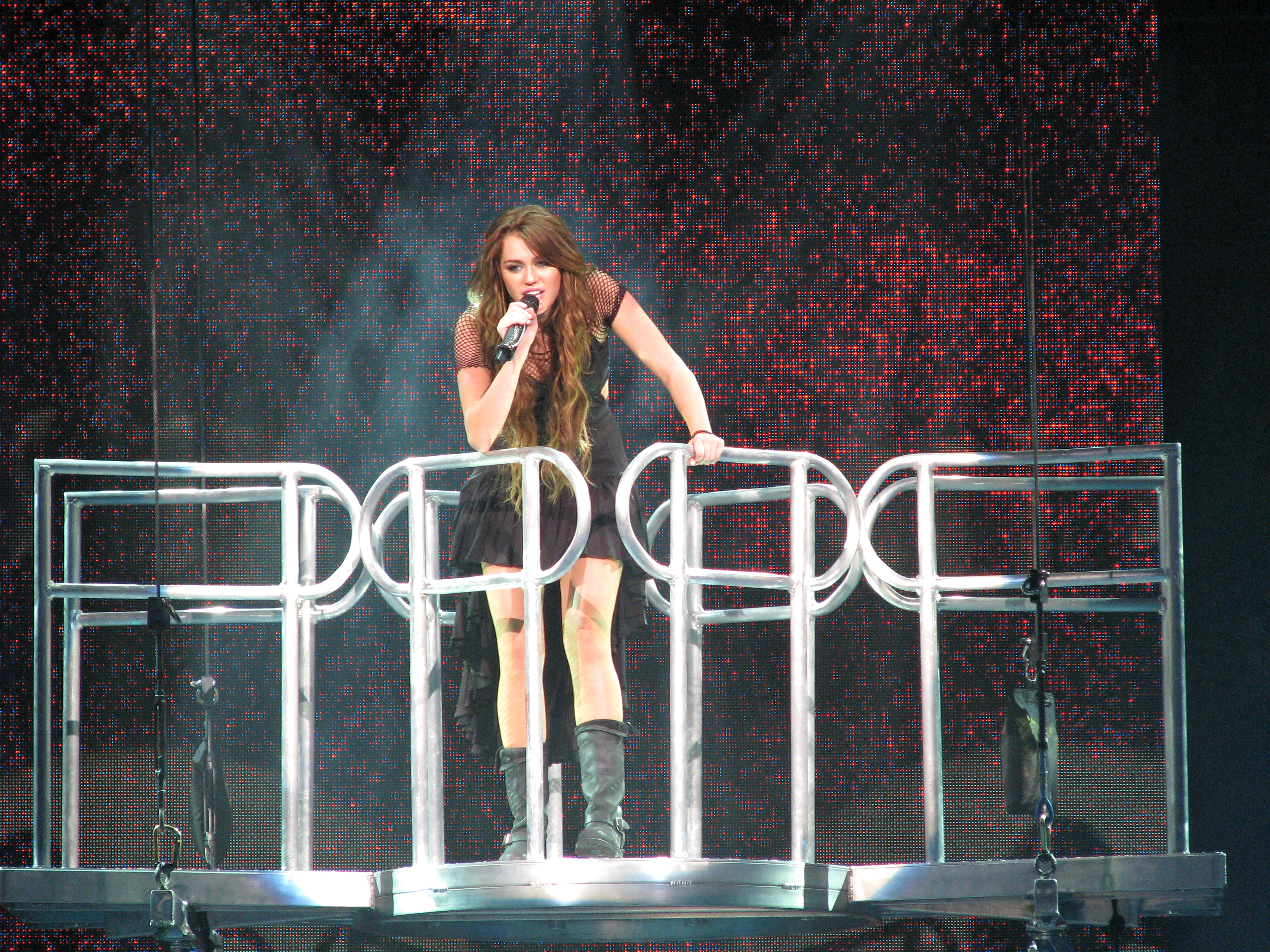 A teen singing.